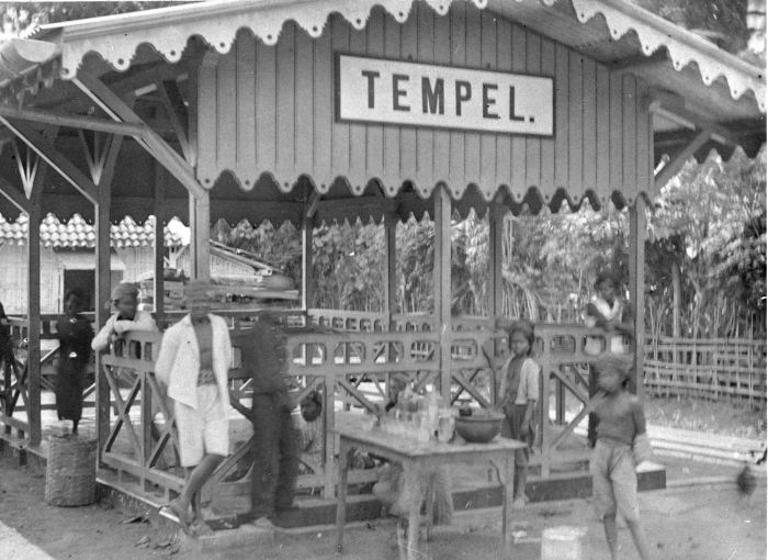 Foto. Straatverkoop bij het station Tempel op het stoomtramtraject Jogjakarta-Moentilan, Midden-Java.